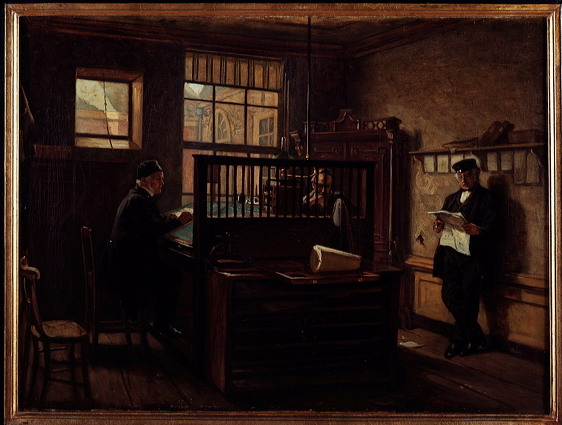 schilderij; ambachten en beroepen; fabrieks-en thuisnijverheid; interieur; genre; Spakler & Tetterode; Lijnbaansgracht